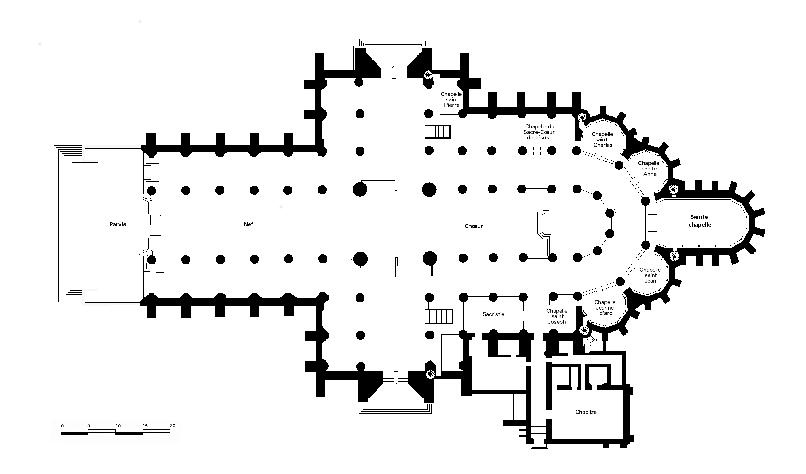 Plan de la cathédrale Notre-Dame-de-la-Treille de Lille.